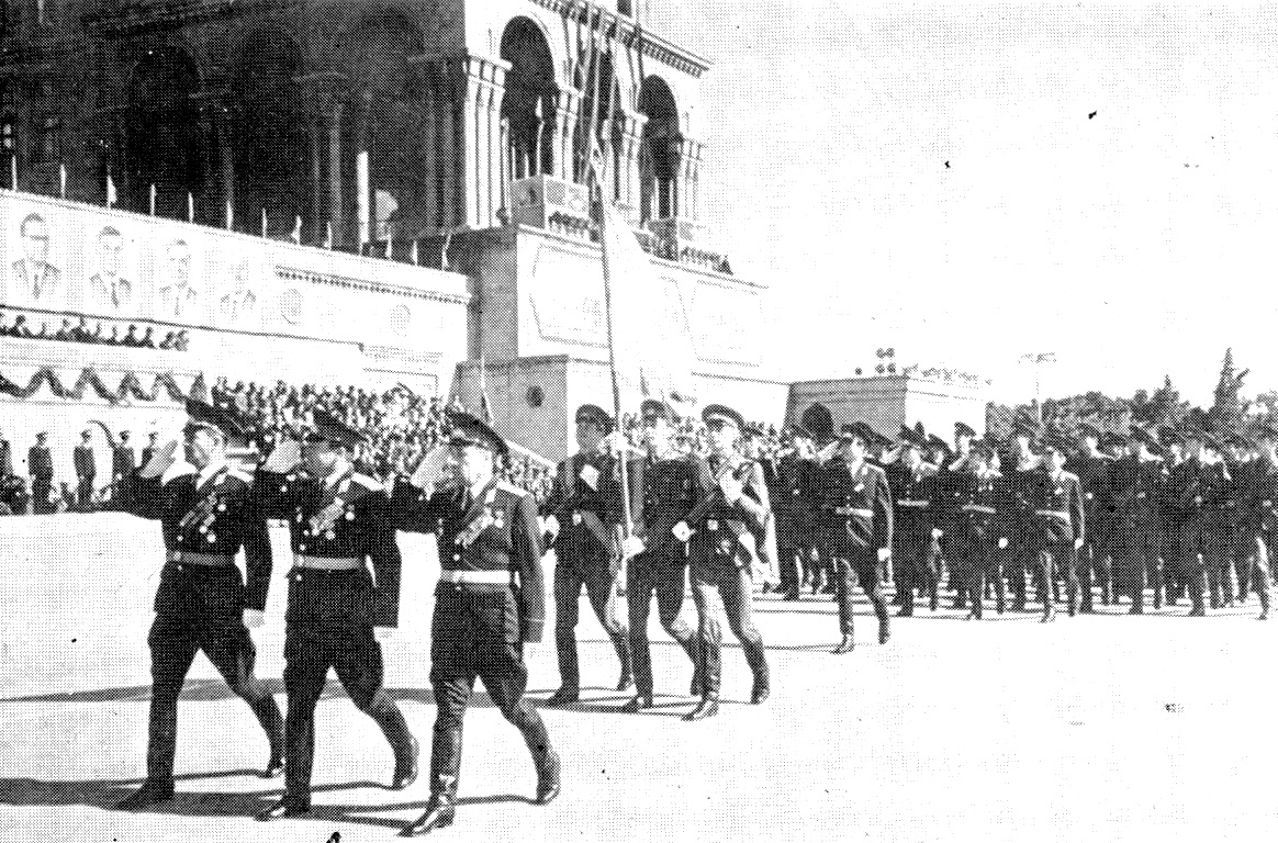 Парад на площади им. В.И. Ленина, 1970 г. Полковники Чурилов И.К., Смазилкин ВС., Злодеев И.В.